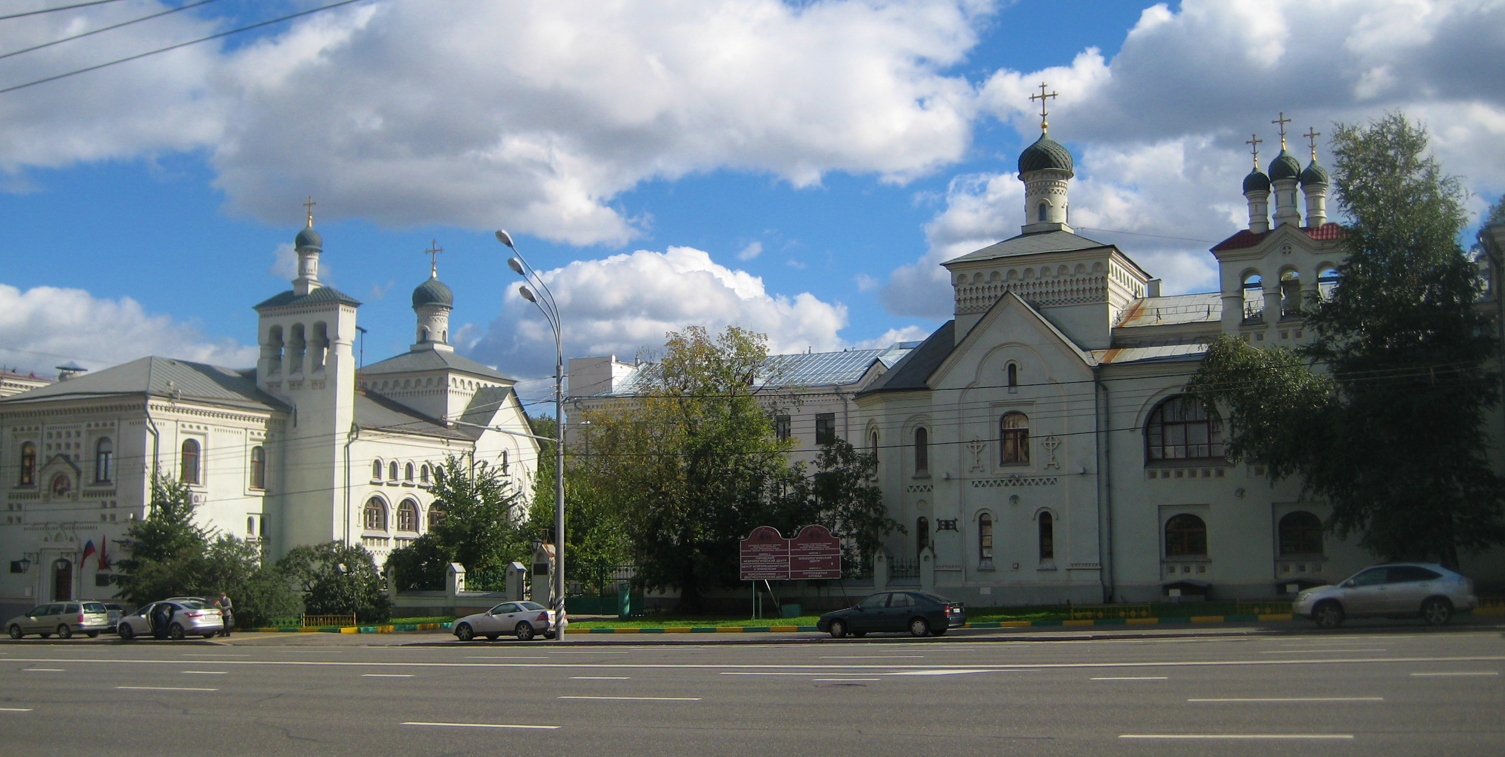 Ленинский проспект